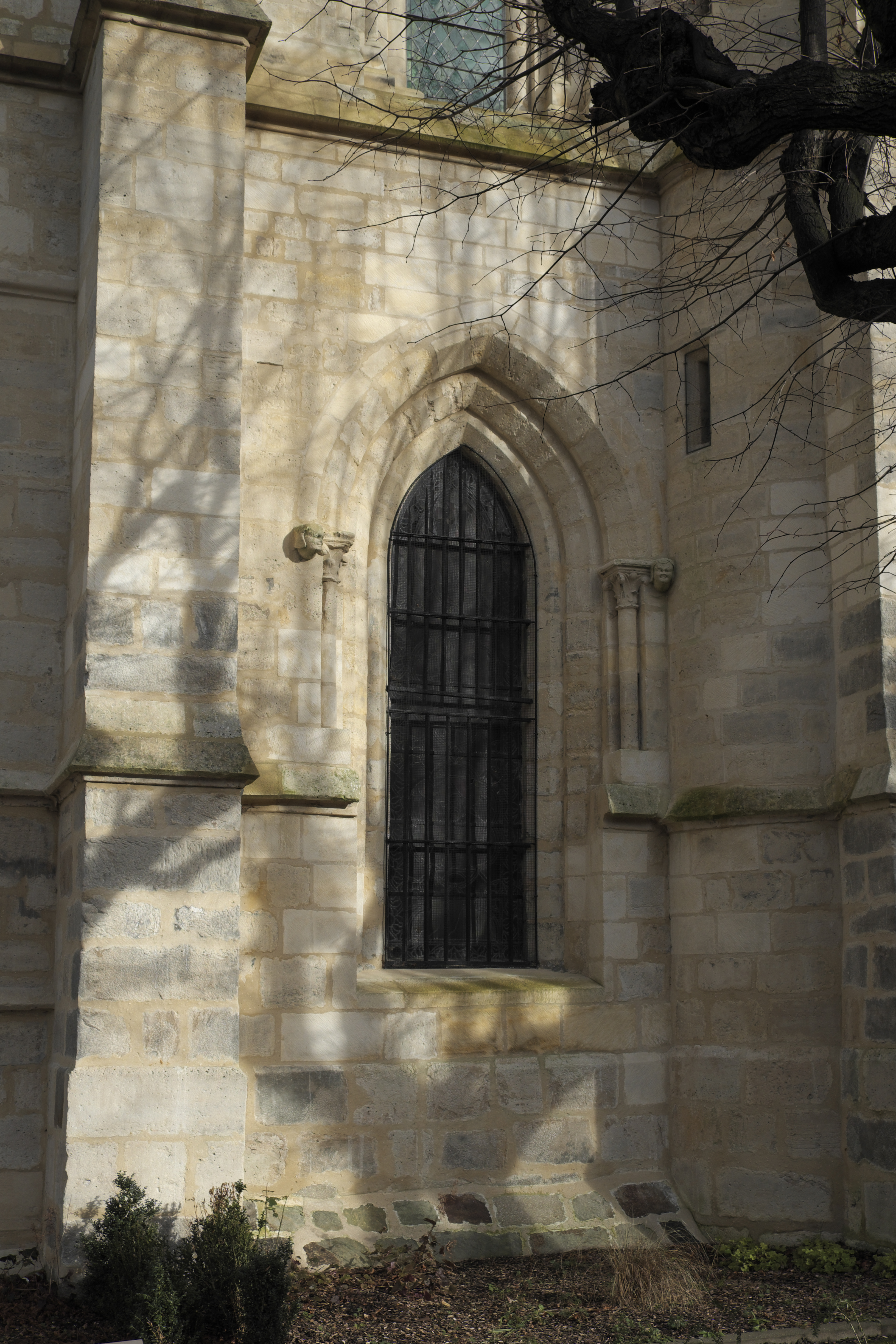 Katholische Pfarrkirche Saint-Martin in Longjumeau im Département Essonne (Île-de-France/Frankreich), Fenster